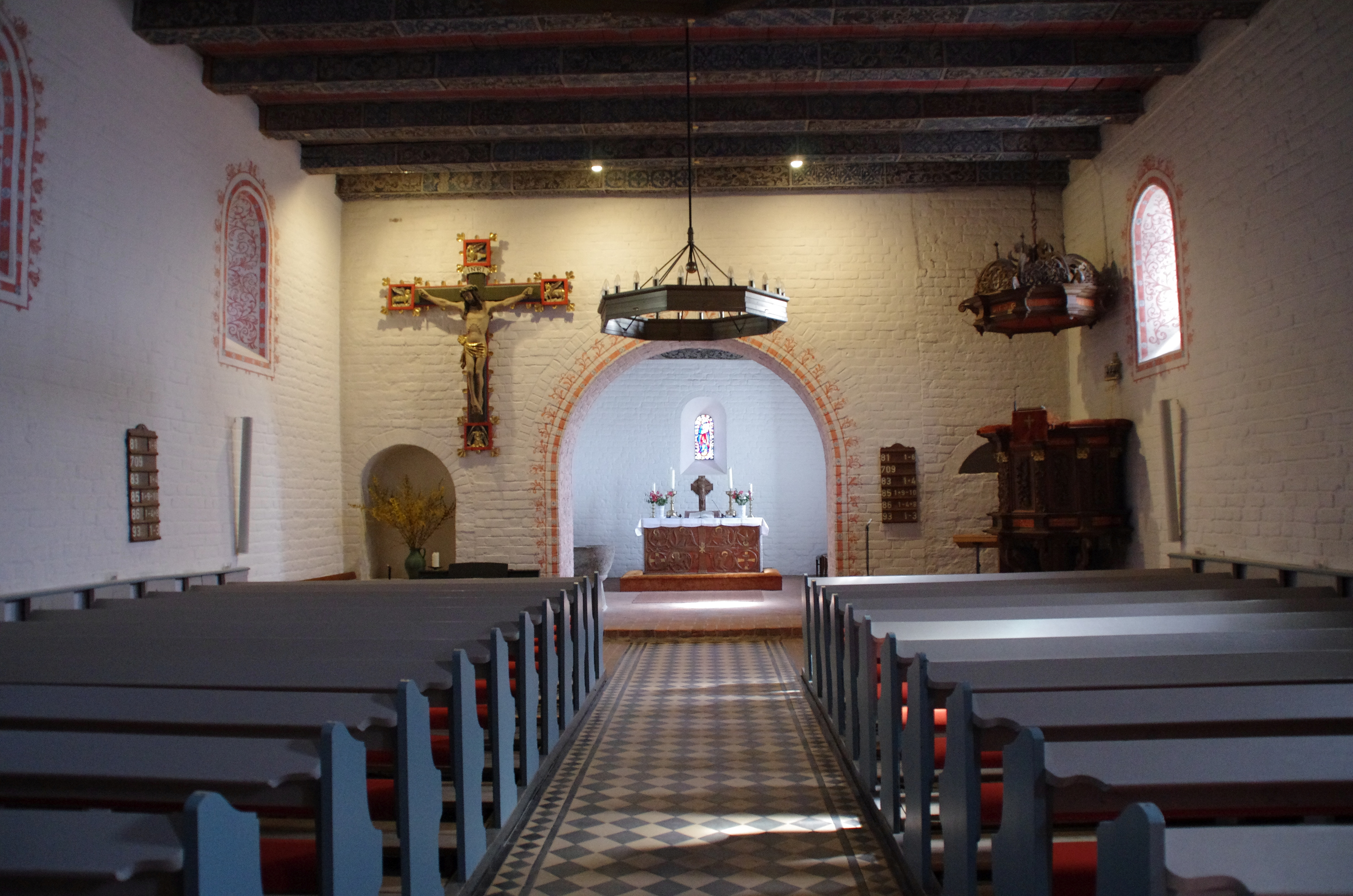 Boren in Schleswig-Holstein. Die Kirche ist mit dem Kirchhof denkmalgeschützt.